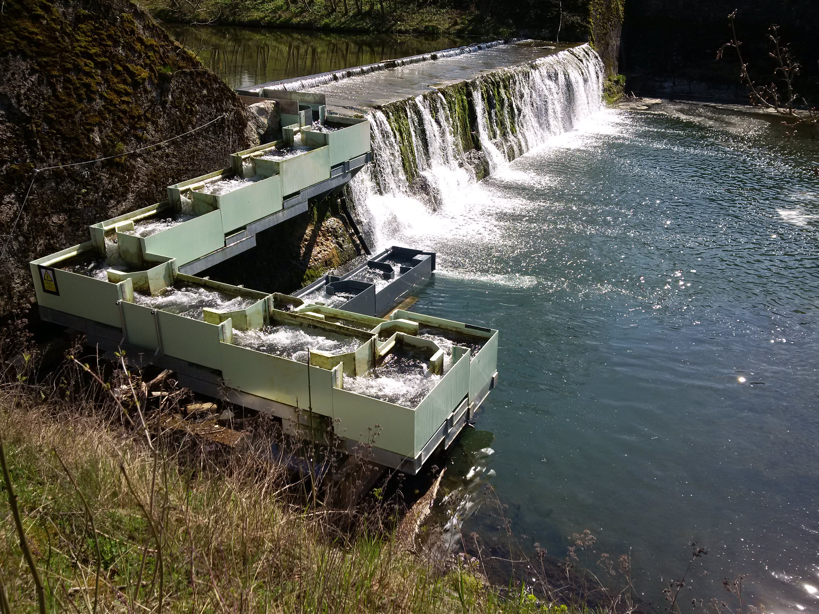 Testanlage Steffstep in Kollbrunn an der Töss